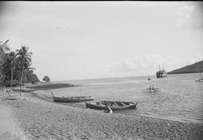 negatief. Schip in baai op Poelau Tahoelandang